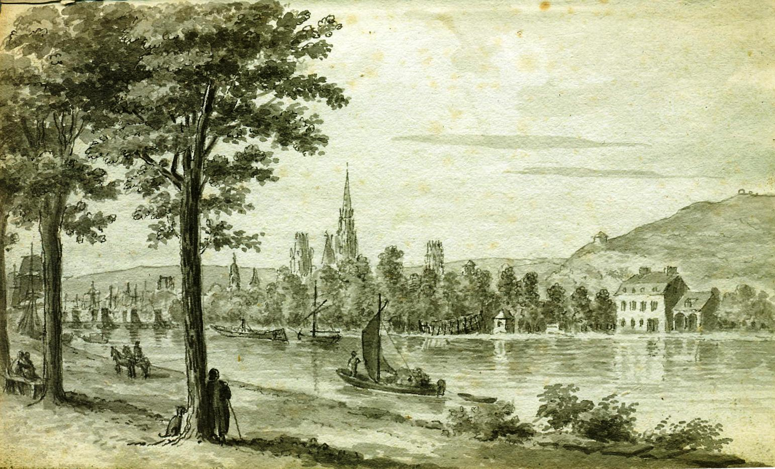 dessin et lavis